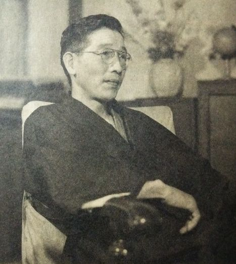 大井篤